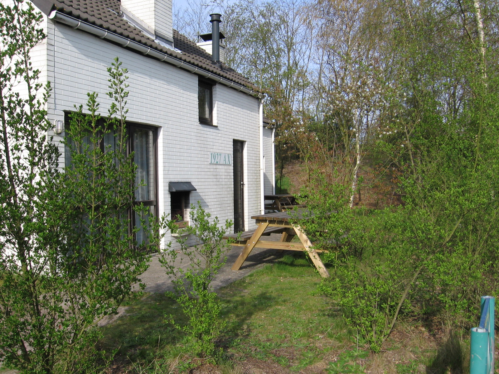 Geschakelde villa's op Kempense Meren, het standaard uiterlijk van de villa's op een Sunparks park.